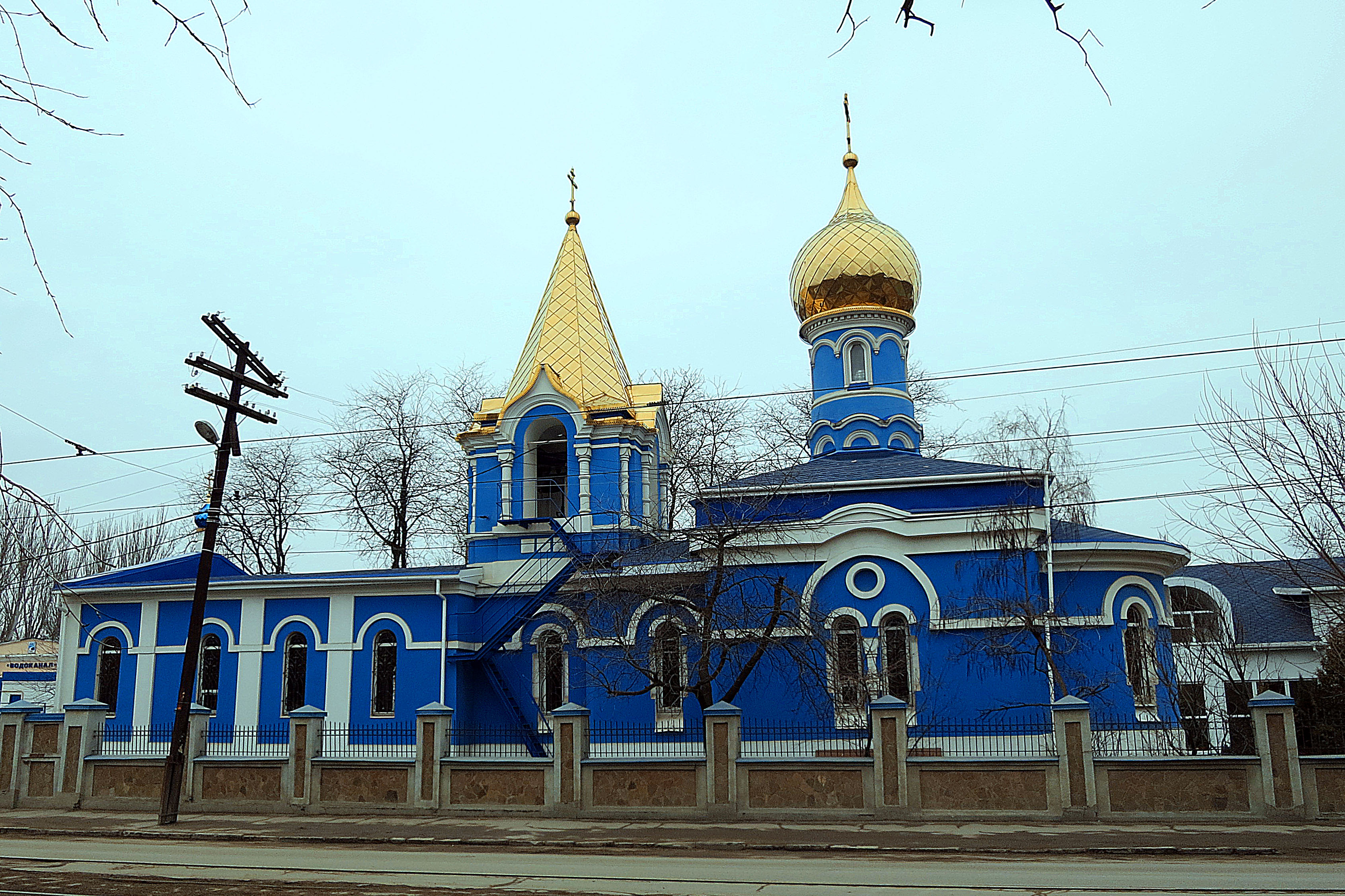 Храм во Имя Святой Мученицы и Царицы Александры Римской: улица Ченцова, 3, литер А, Ростов-на-Дону, Ростовская область